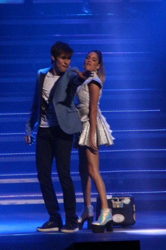 Violleta-007